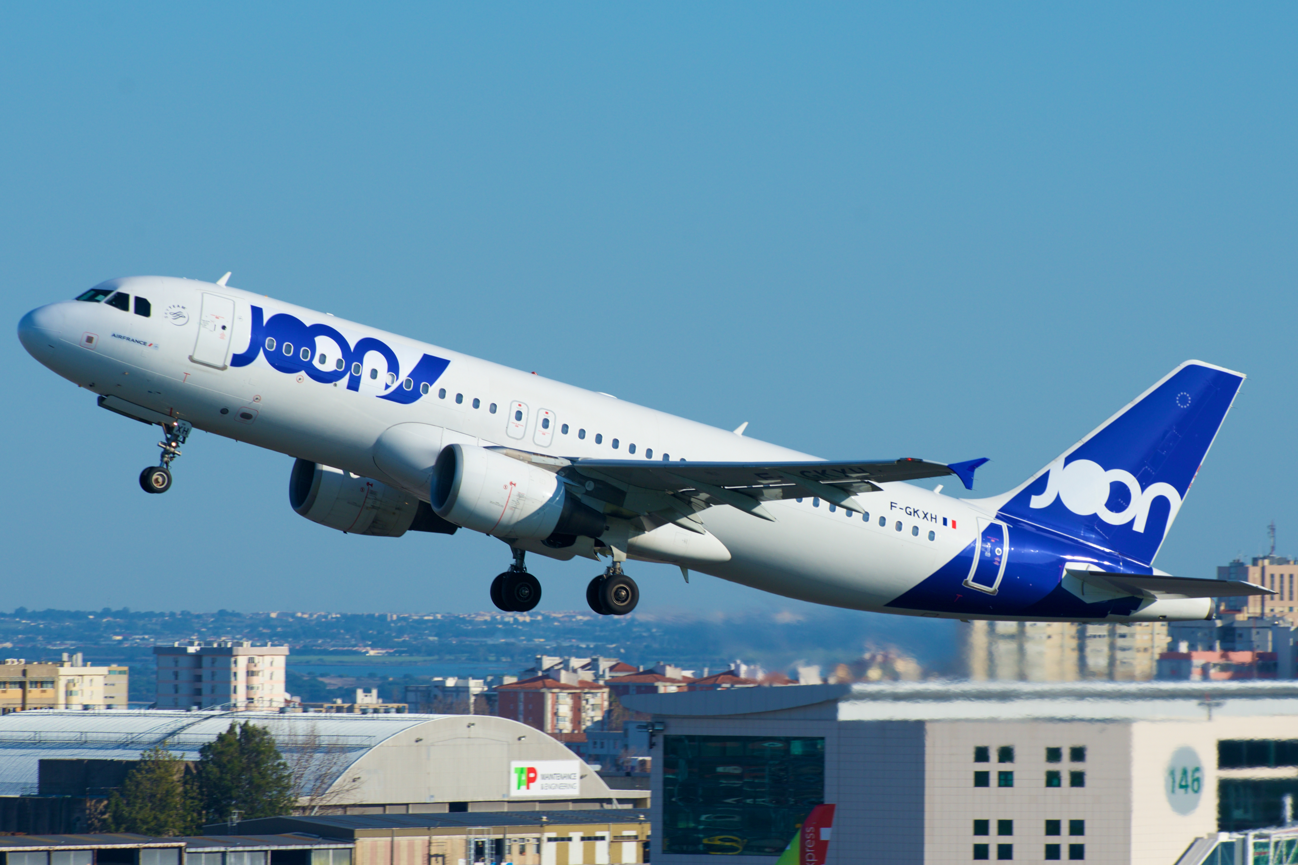 JOON Airbus A320 F-GKXH